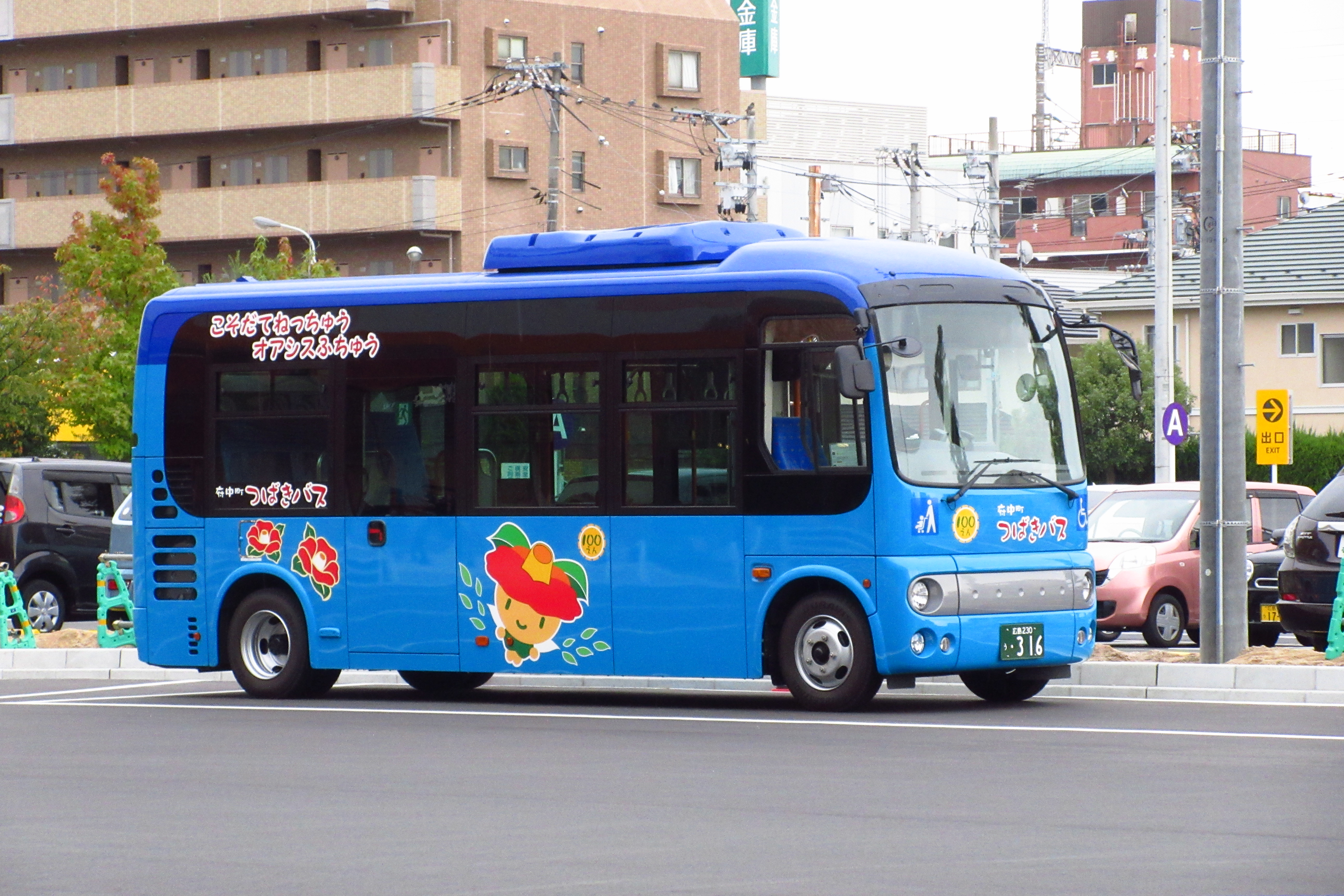 広島県安芸郡府中町が運営する町営コミュニティバスです。